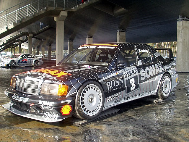 Mercedes Benz 190E, que compitió en el DTM en 1992. Description: Mercedes 190 Evo Meisterauto 1992 mit Klaus Ludwig Capture date: 2004-10-02 Photographer: sgm